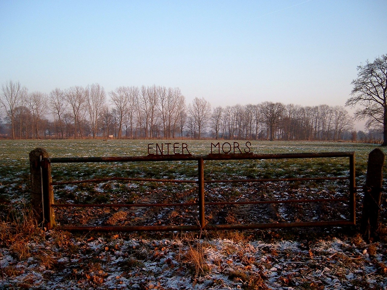 2008 Enter hek Enter Mors